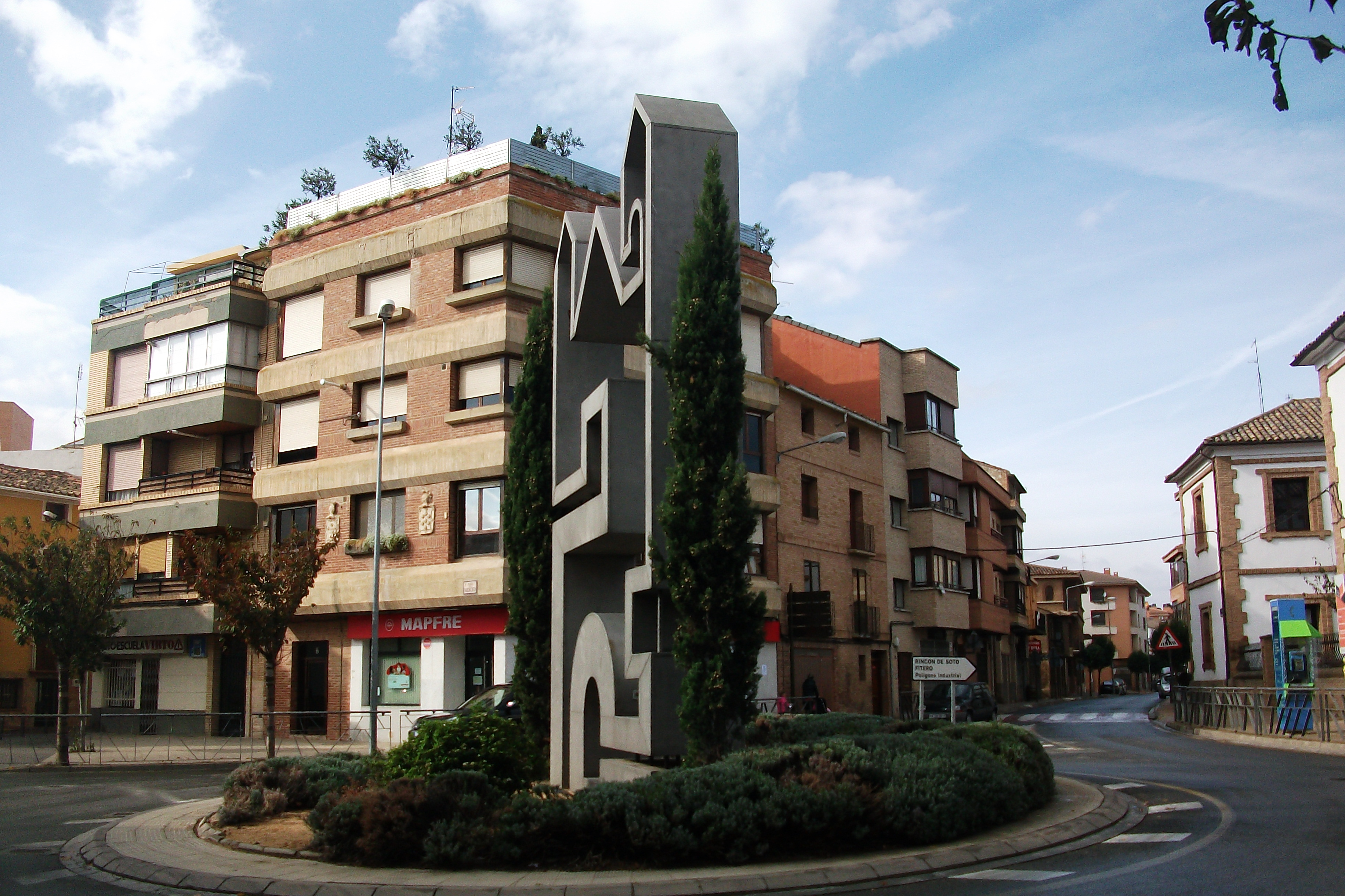 Corella. Imagen del pueblo. Noviembre de 2011